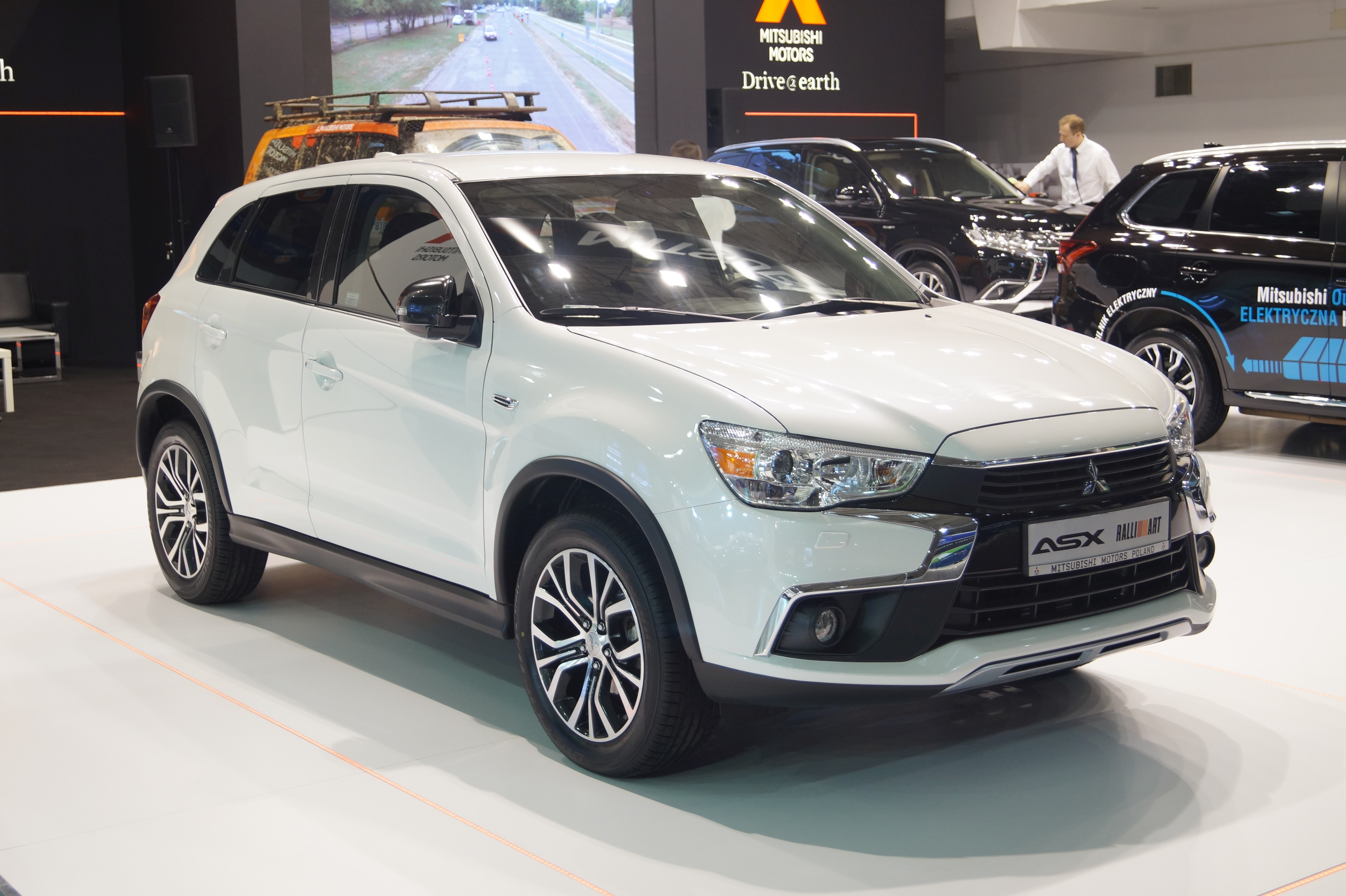 Prawy przód Mitsubishi ASX Ralli Art na Motor Show Poznań 2017.